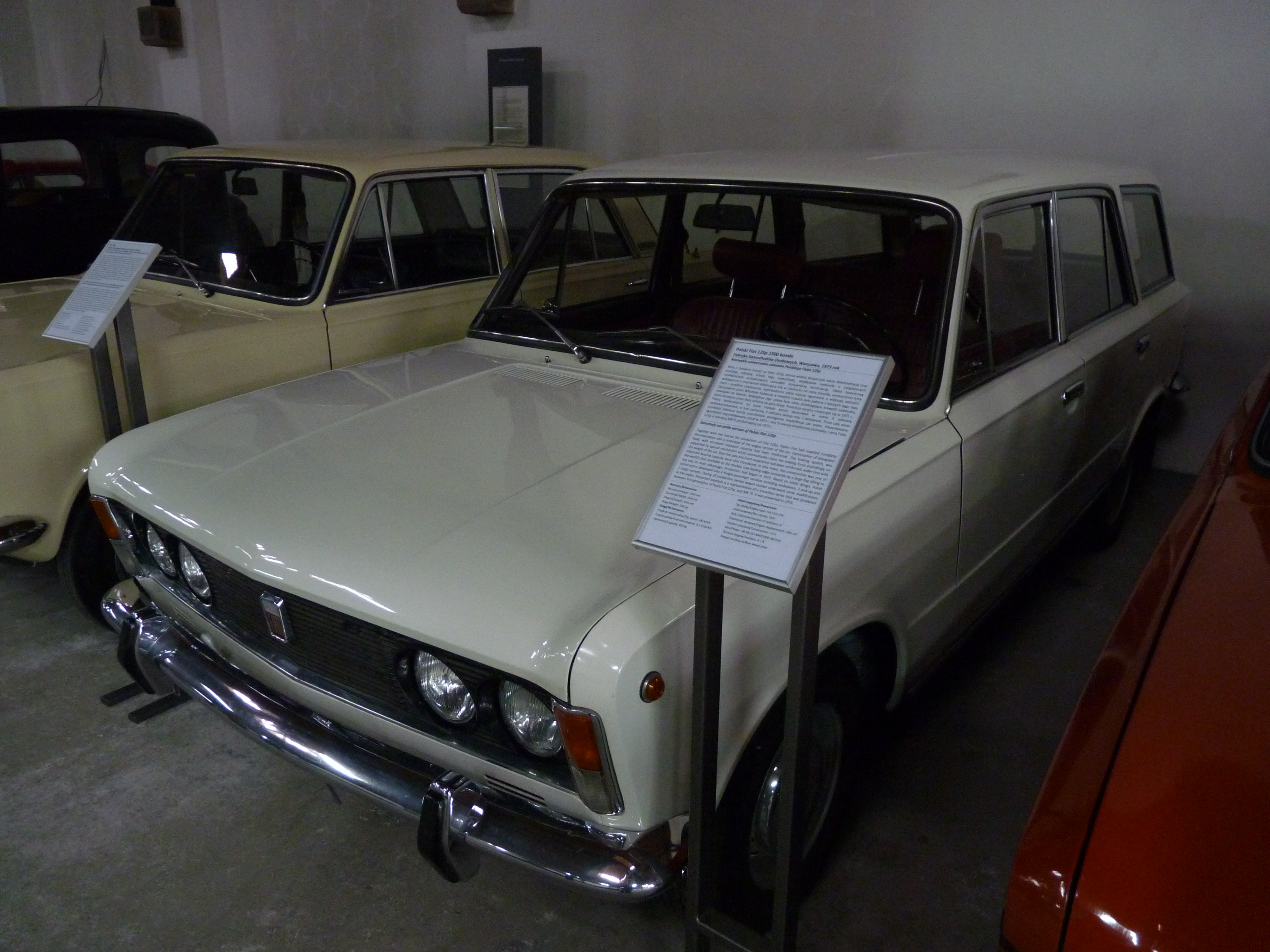 Polski Fiat 125p Kombi MR'73 1500 at the Muzeum Inżynierii Miejskiej in Kraków.JPG